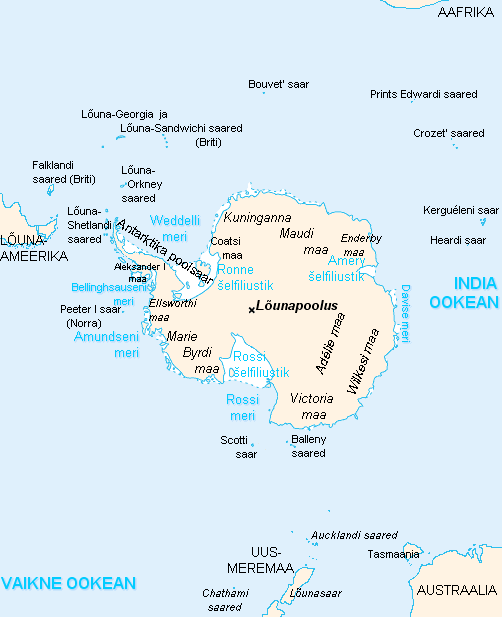 Antarktika kaart